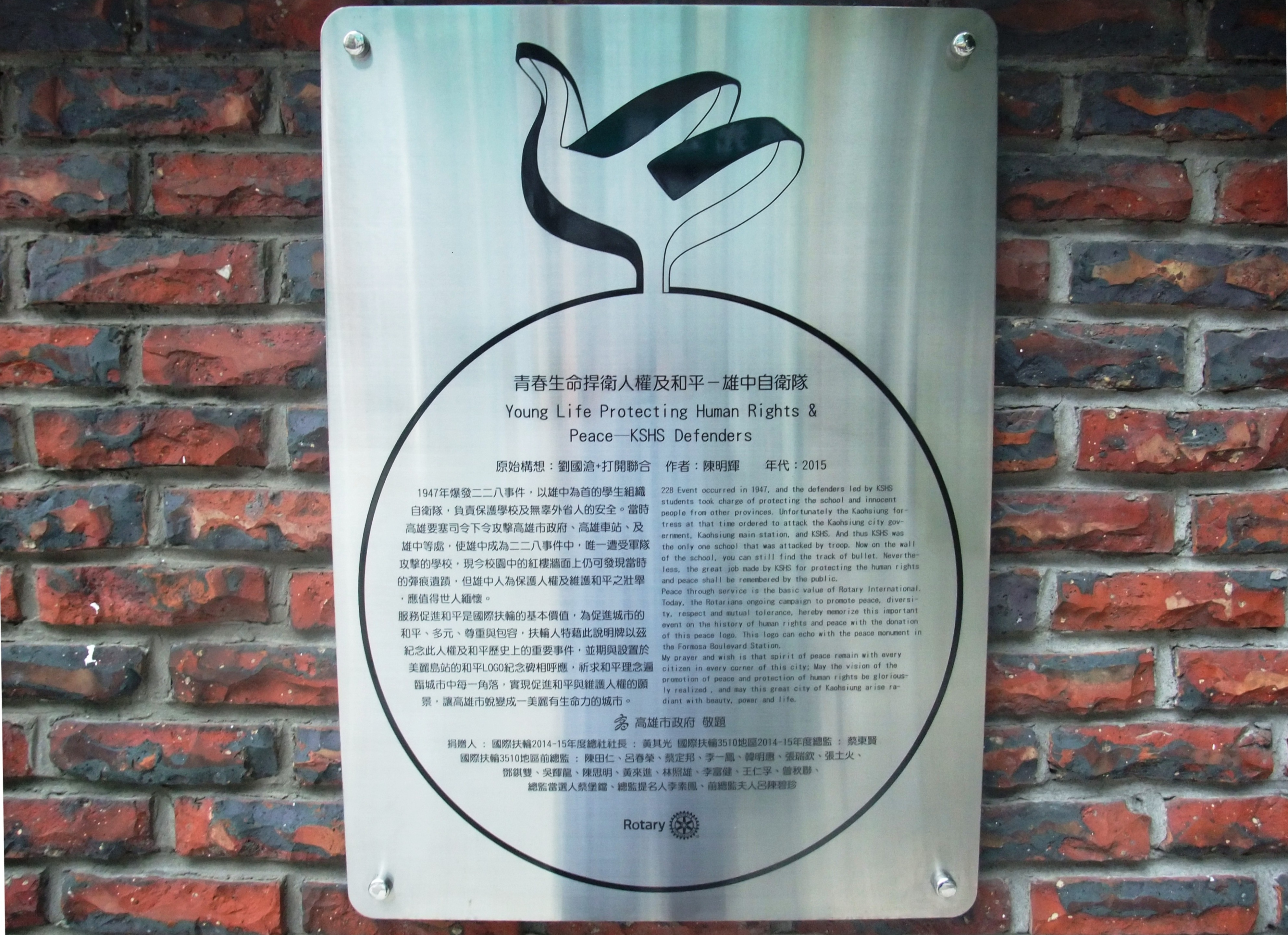 雄中自衛隊的紀念牌，2015年陳明輝作，高雄市政府題。